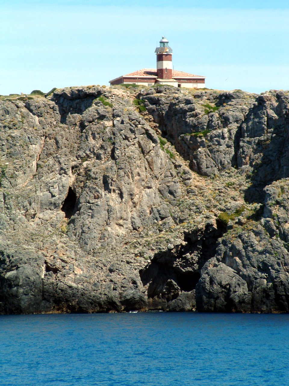 Giannutri- Il Faro Autore: Simone F. Franci